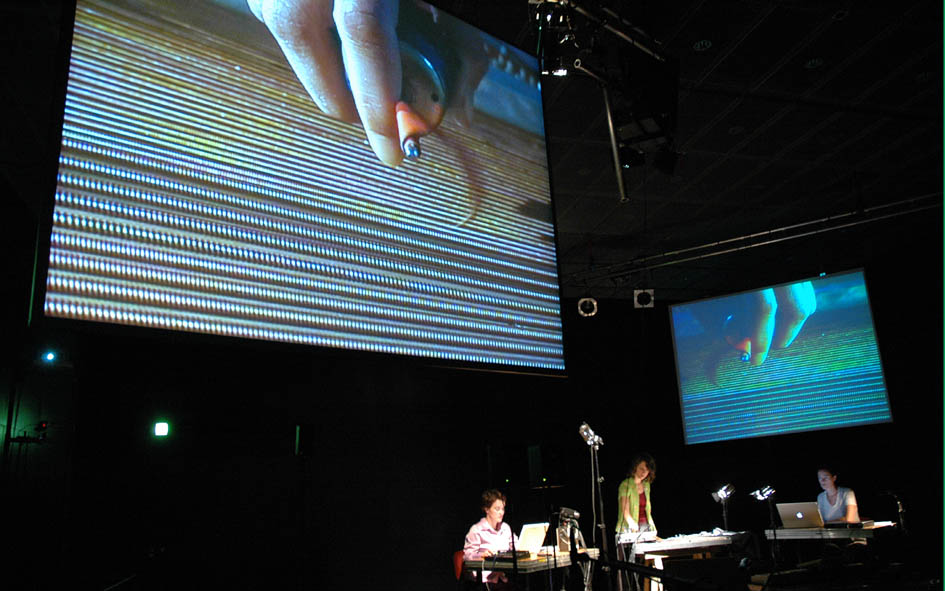 Audio-Video-Concert SCRAP